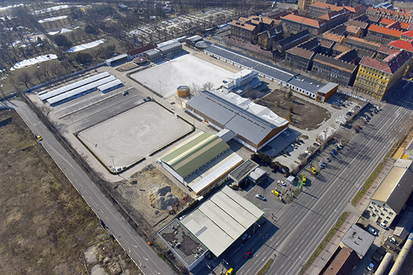 Nemzeti lovarda (Cím: Budapest, Kerepesi út 7, 1087), légi fotó